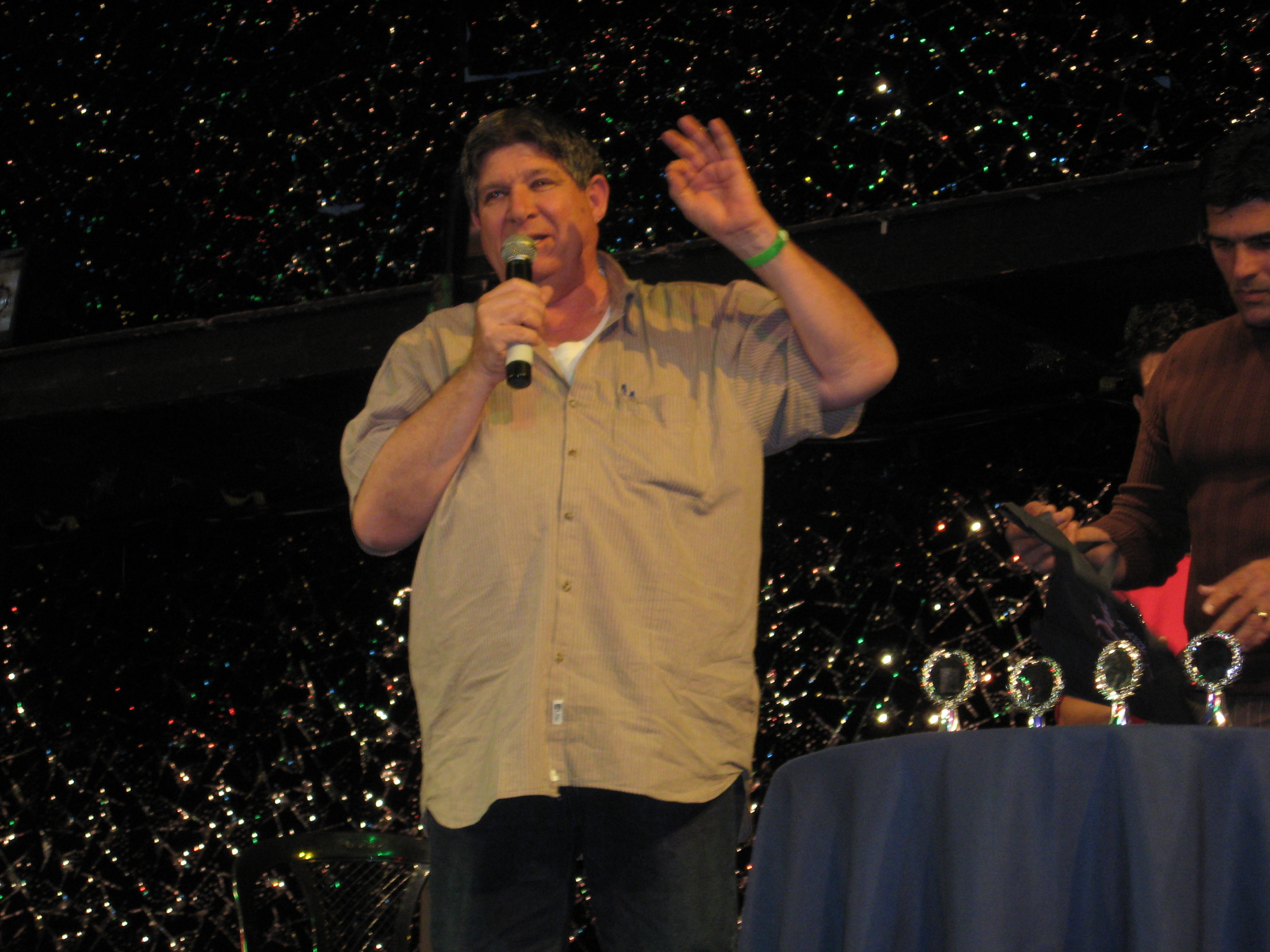 שלומי הופמן בכנס המחול הארצי באילת